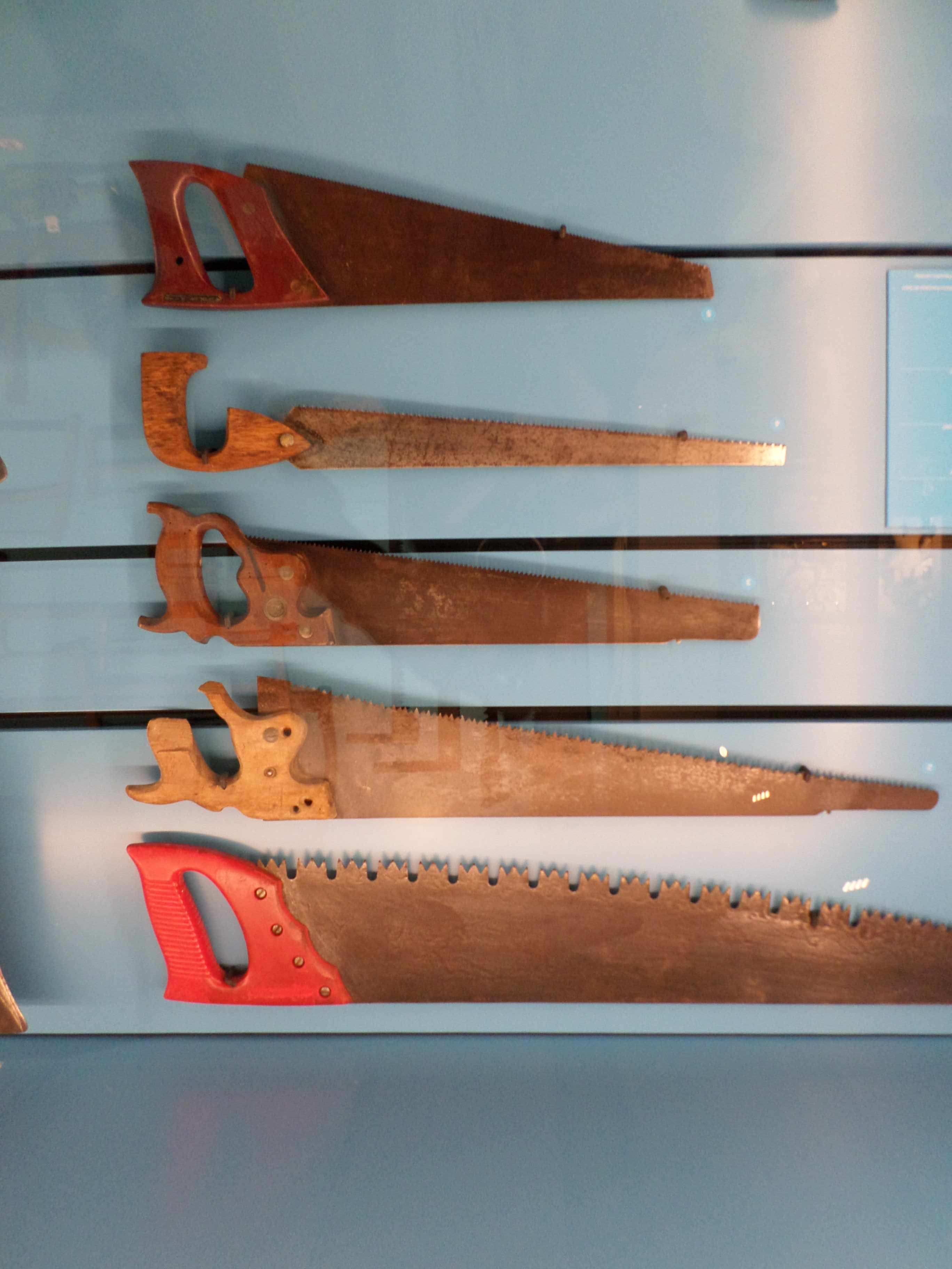 scie